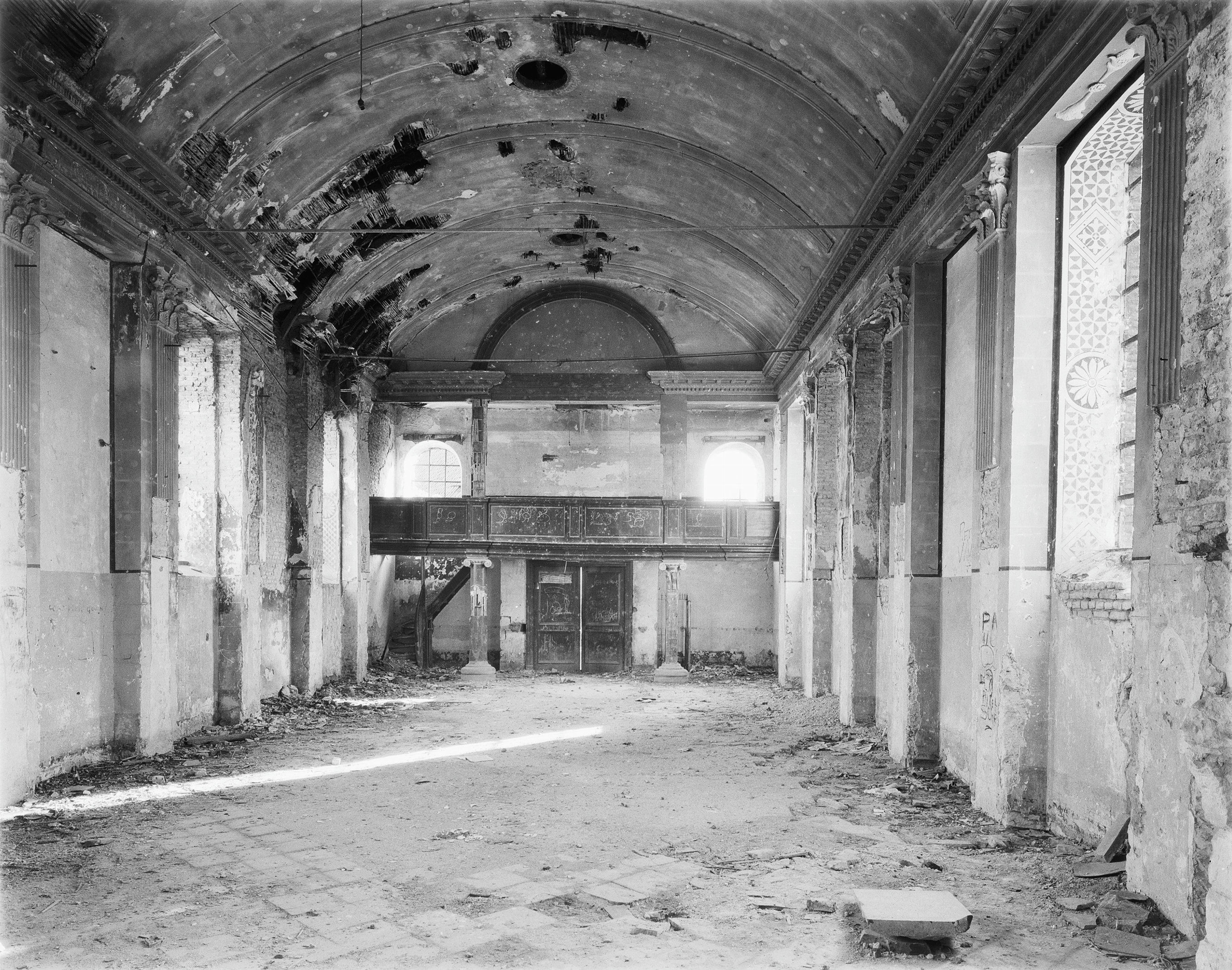 Oude Rooms-katholieke kerk (architect: Mathias Soiron); in 1955 gesloopt